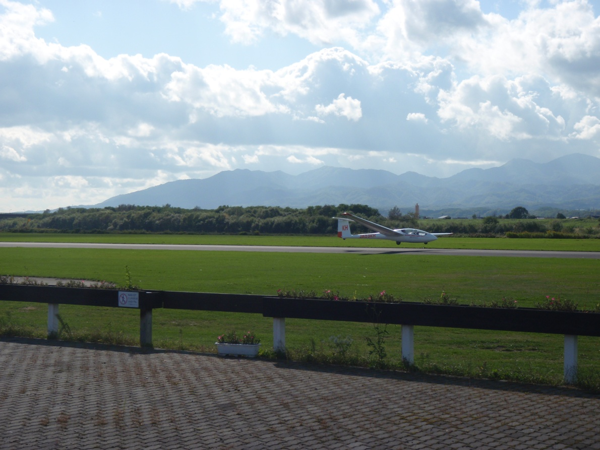 滝川航空公園、グライダーの離陸